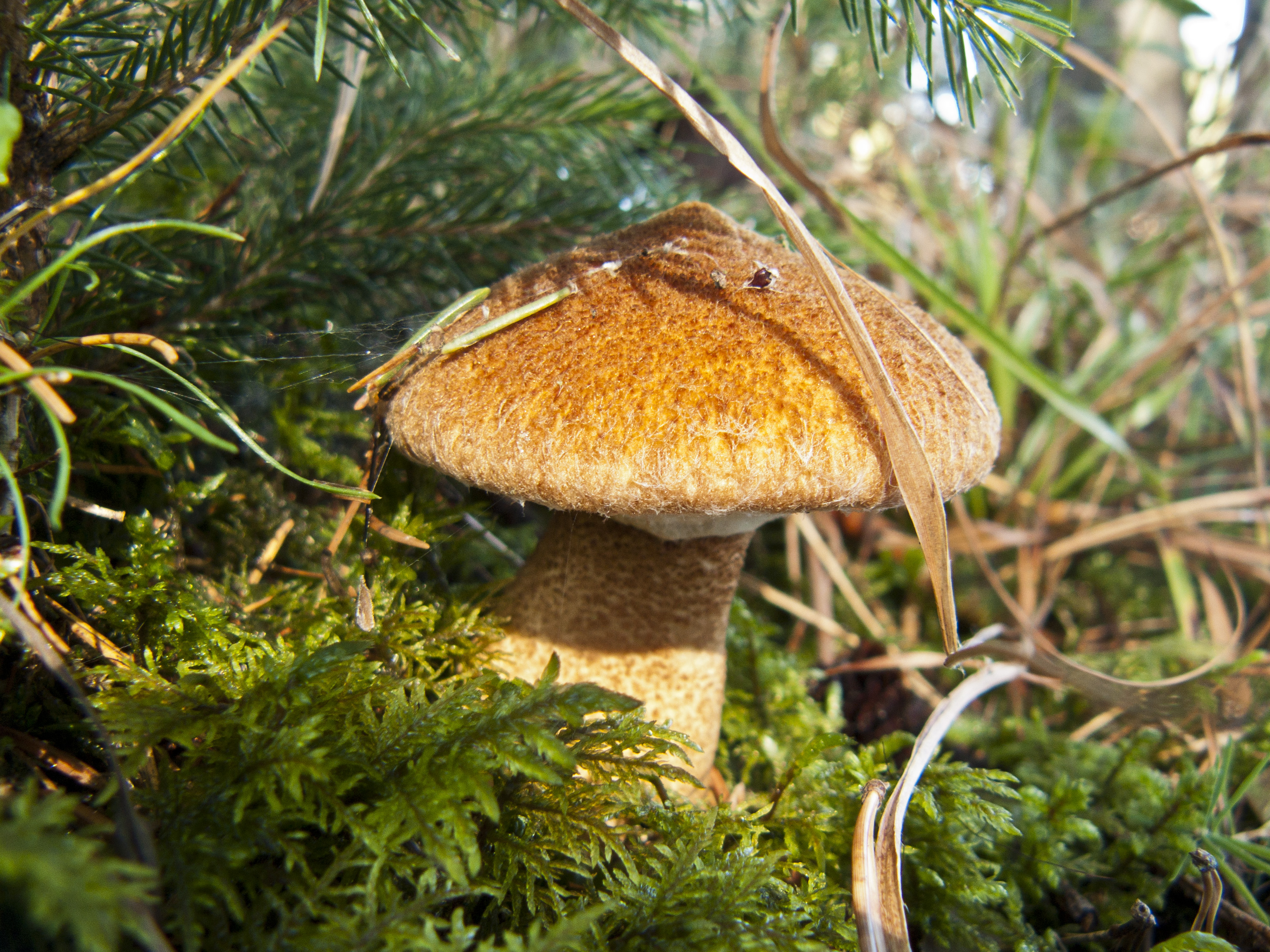 Hřib dutonohý (Suillus cavipes) - Sedlčansko